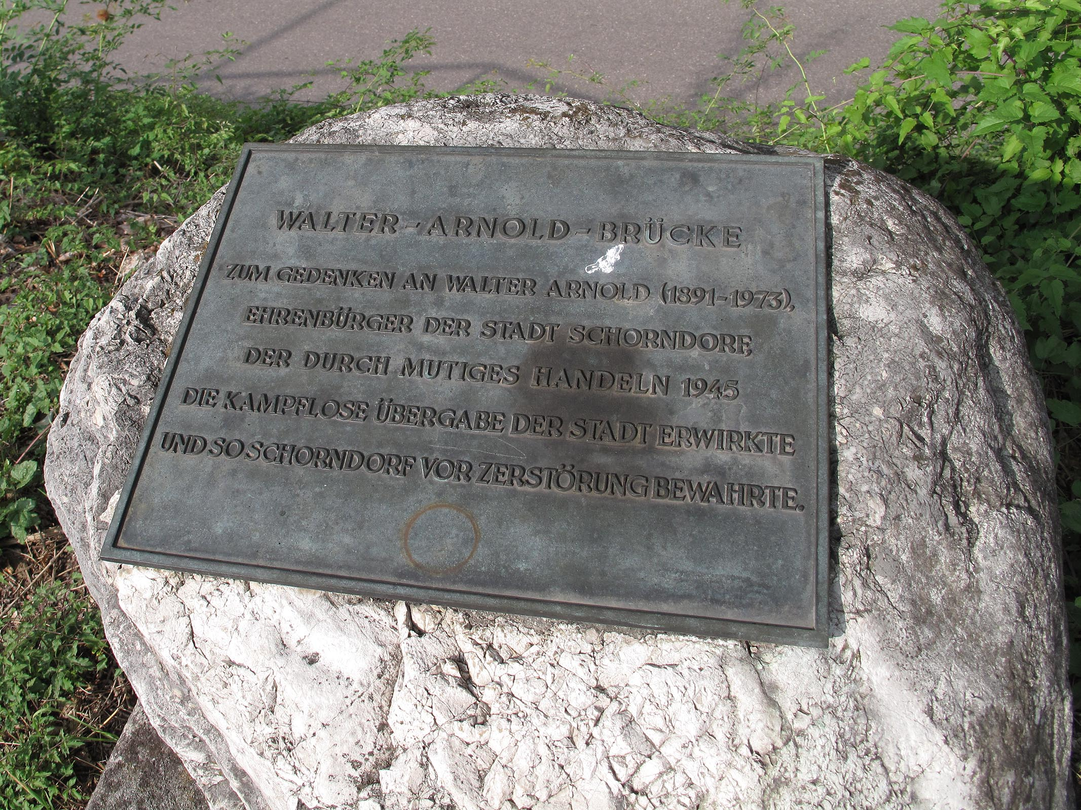 Gedenkstein für Walter Arnold - auf der Walter-Arnold-Brücke, Schorndorf, Baden-Württemberg